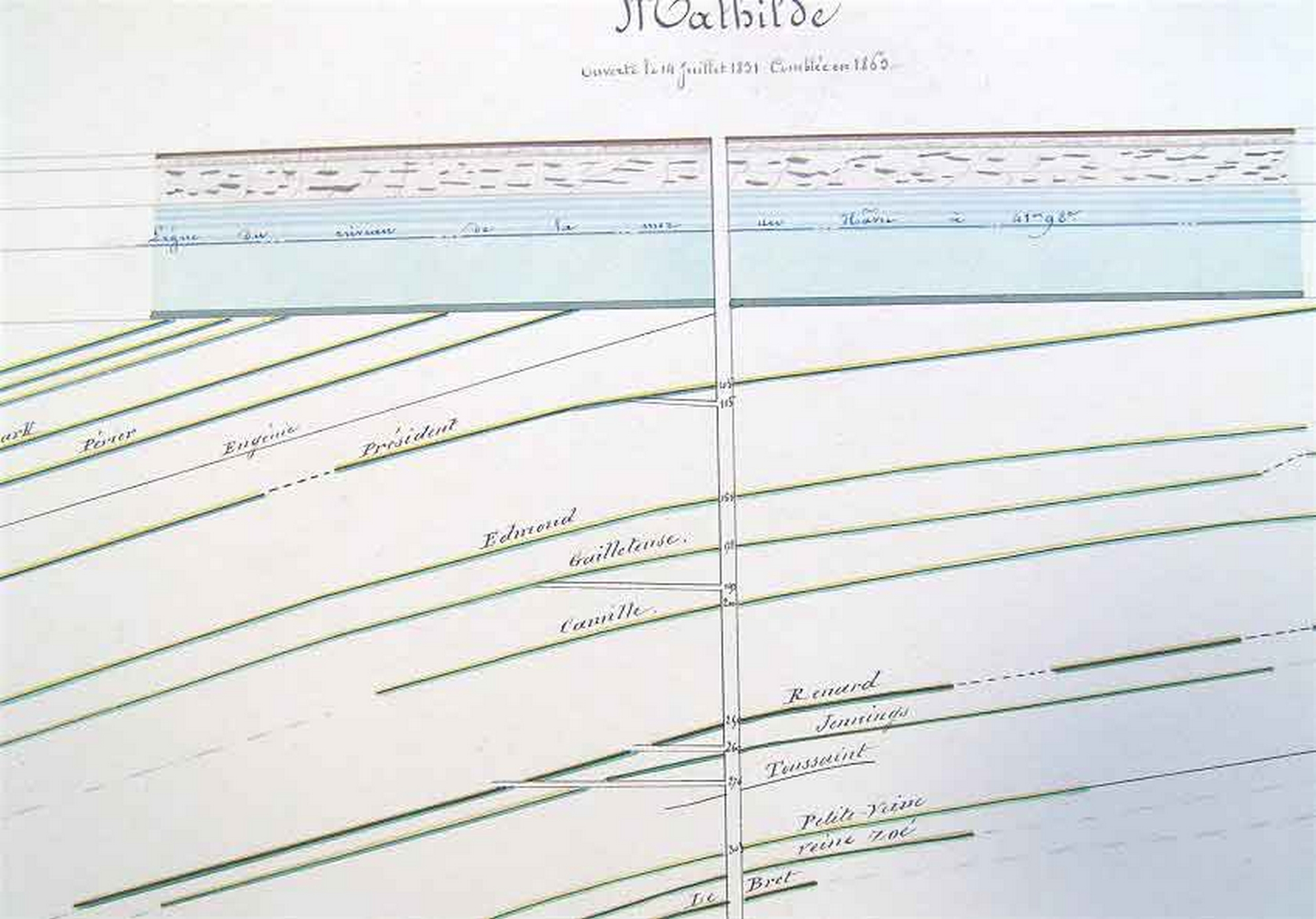 La fosse Mathilde de la Compagnie des mines d'Anzin était un charbonnage du bassin minier du Nord-Pas-de-Calais constitué d'un seul puits situé à Denain, Nord, Nord-Pas-de-Calais, France.